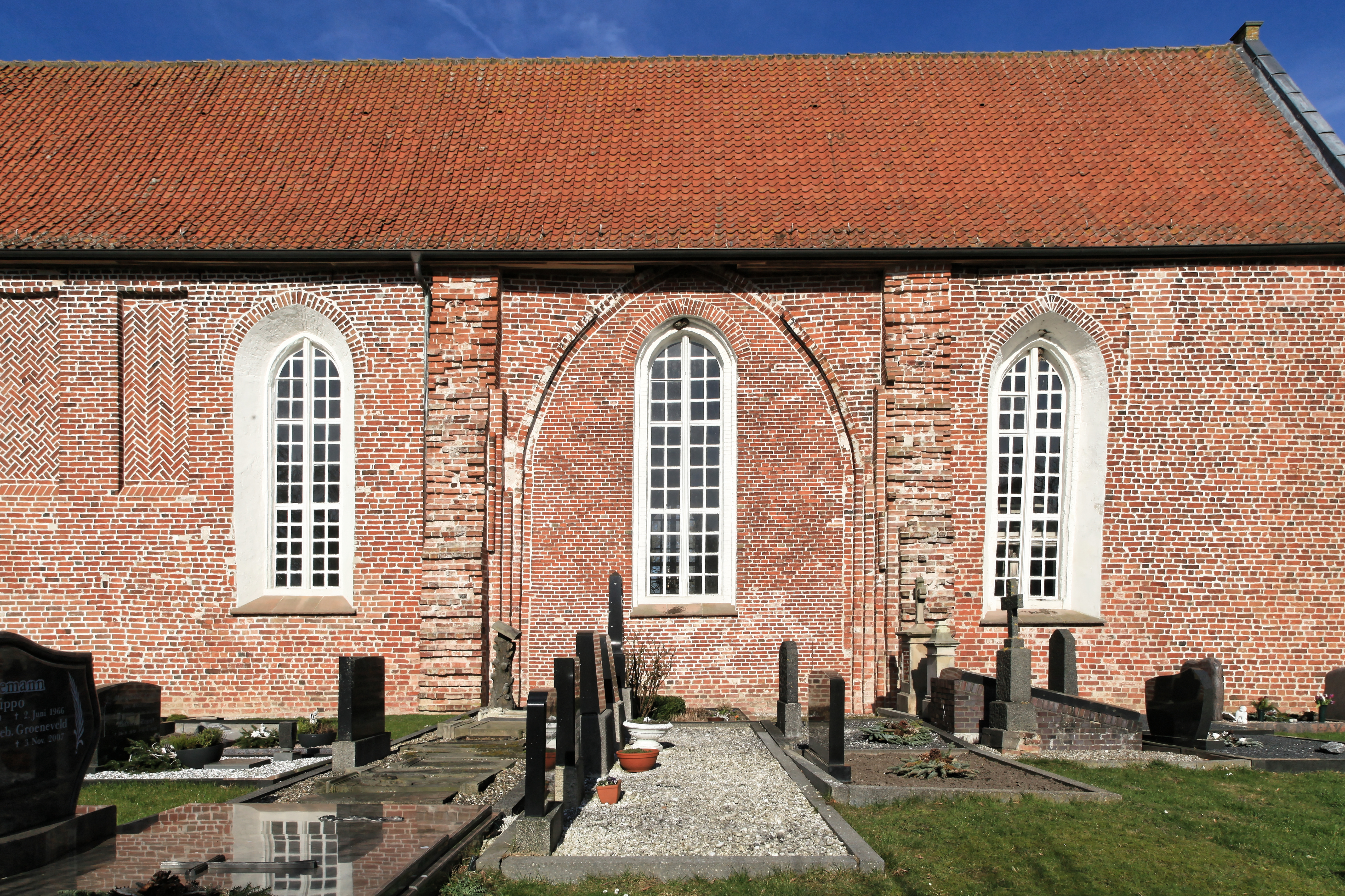 Friedhof und St.-Sebastians-Kirche, Karkgang in Hatzum, Jemgum